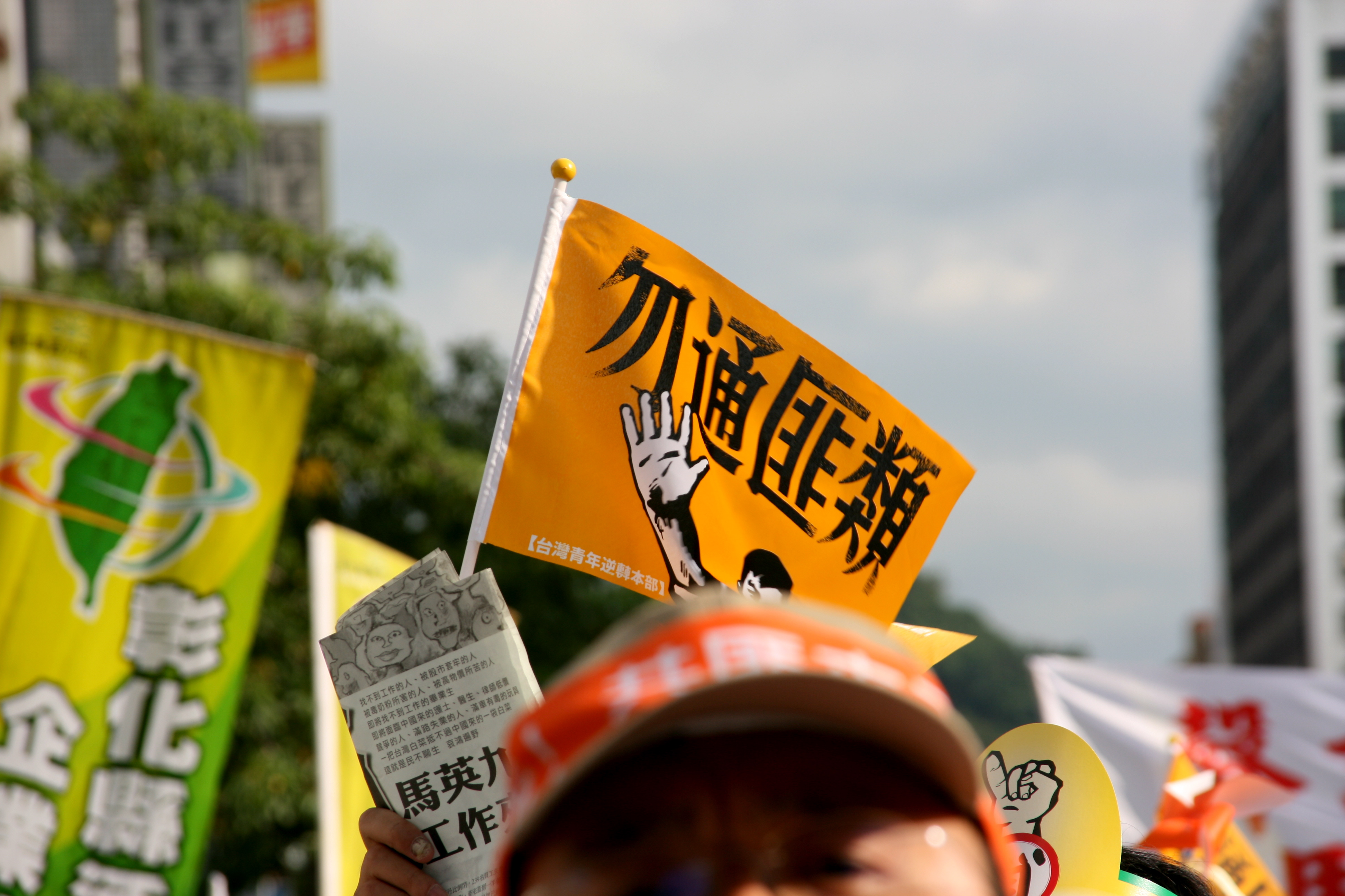 1025反黑心顧台灣大遊行台大線，台灣青年逆轉本部製發的「勿通匪類」旗幟。諷刺的是，2008年1月4日，台灣獨立運動人士謝聰敏在以聲援台灣團結聯盟為主旨的「挺台聯，正本土」記者會中抨擊，台灣團結聯盟精神領袖李登輝提出的台灣經濟及社會問題應該受到重視，民主進步黨卻要捏死這種聲音，證明民主進步黨「表面上要打倒蔣介石，卻都在學蔣介石」。